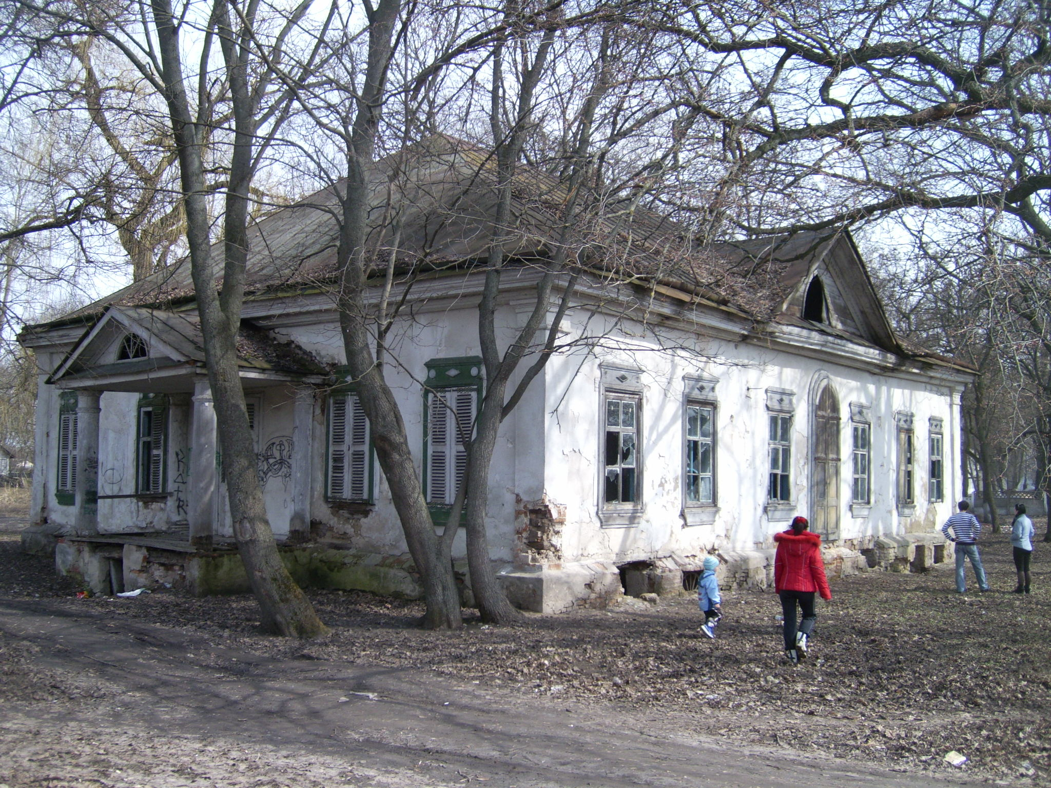 Покорщина. Панський будинок.